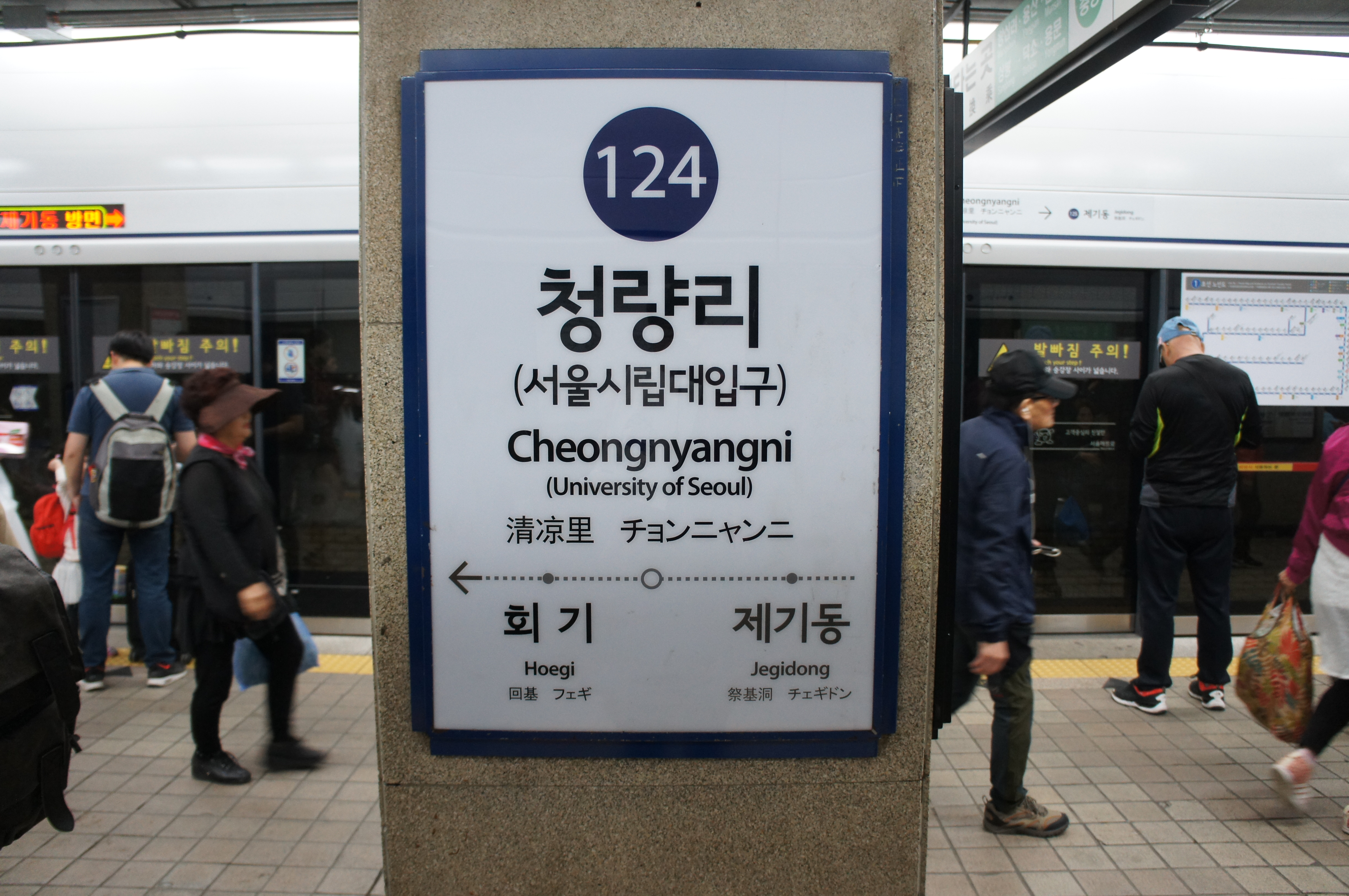 1호선 청량리역 역명판